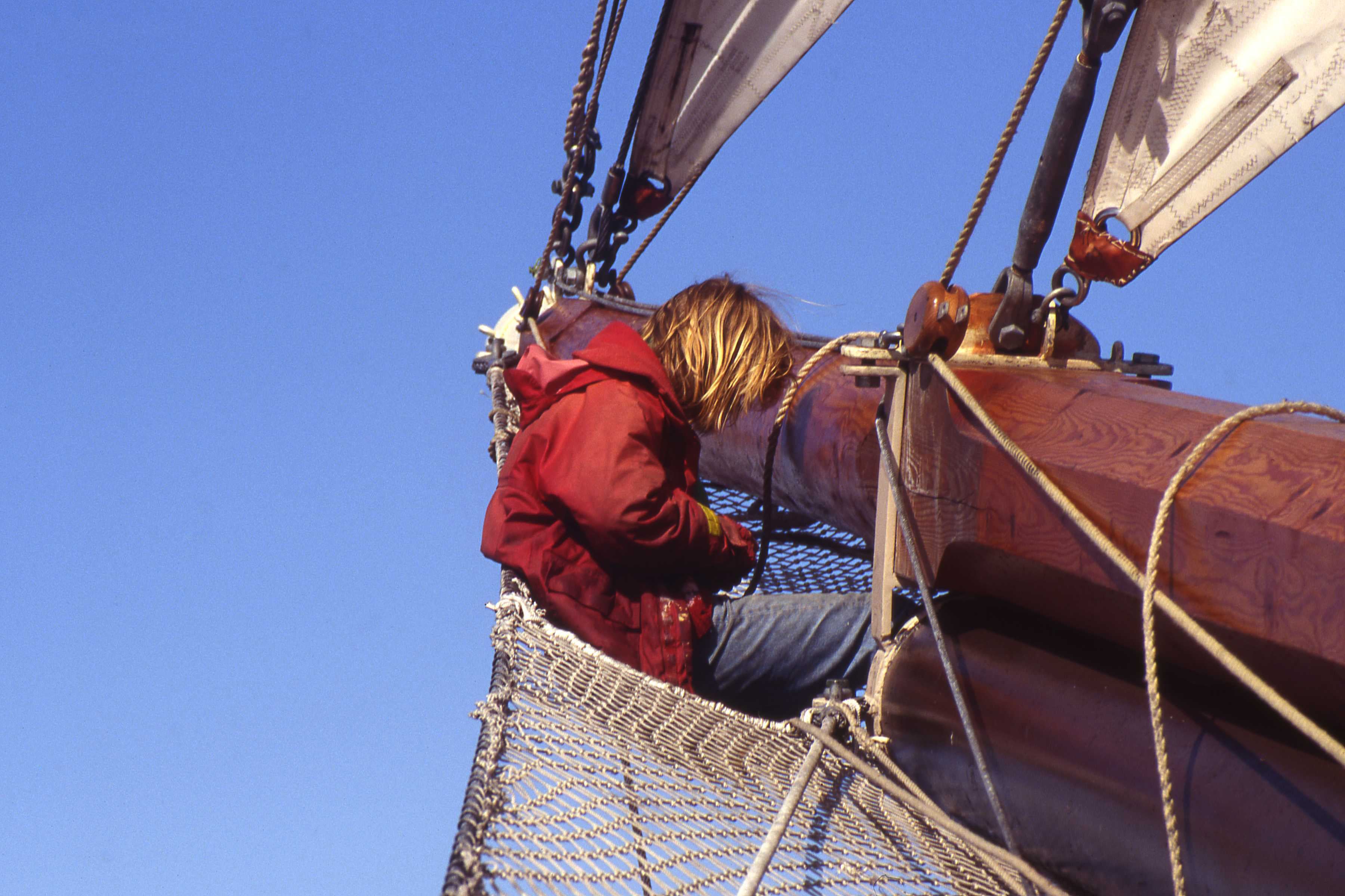 Bemanningslid Maaike in de boegspriet